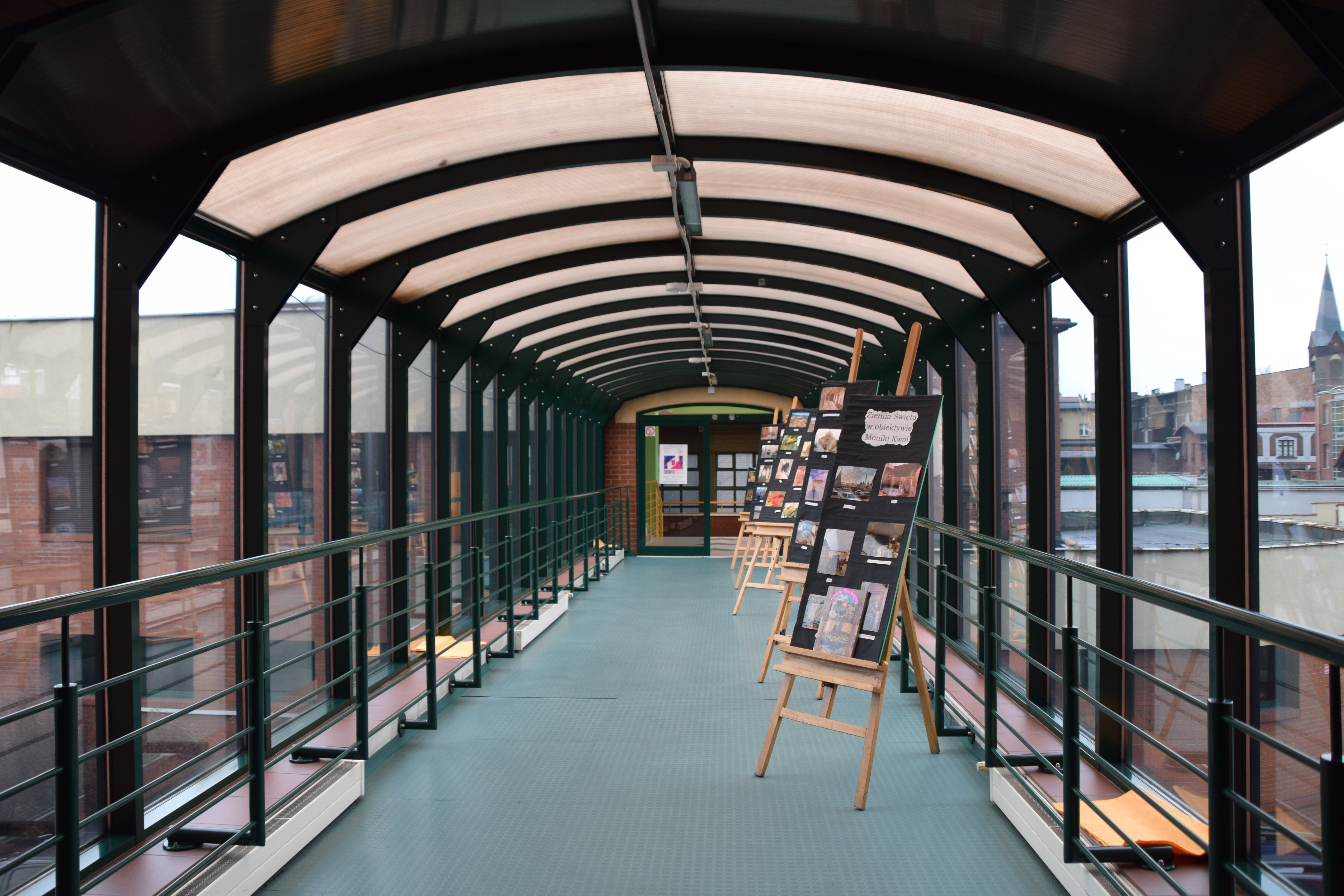 VILO przejście na salę gimnastyczną